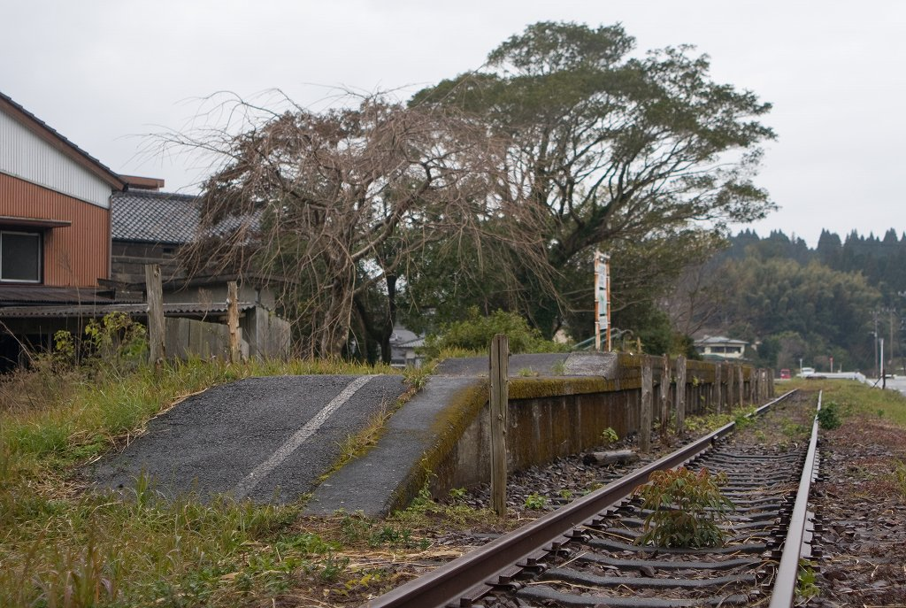 高千穂鉄道西延岡駅